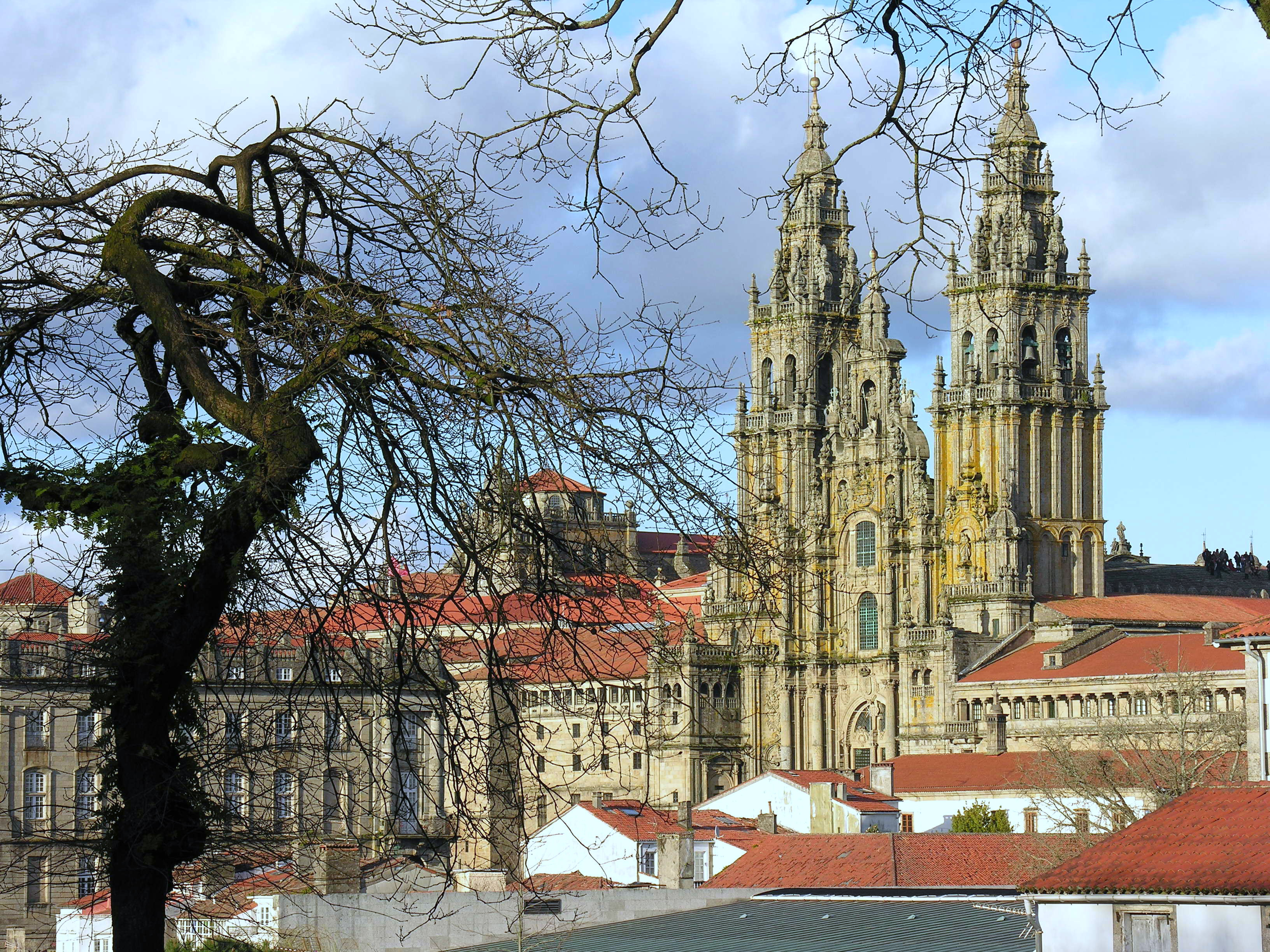 self made Galicia, Spain